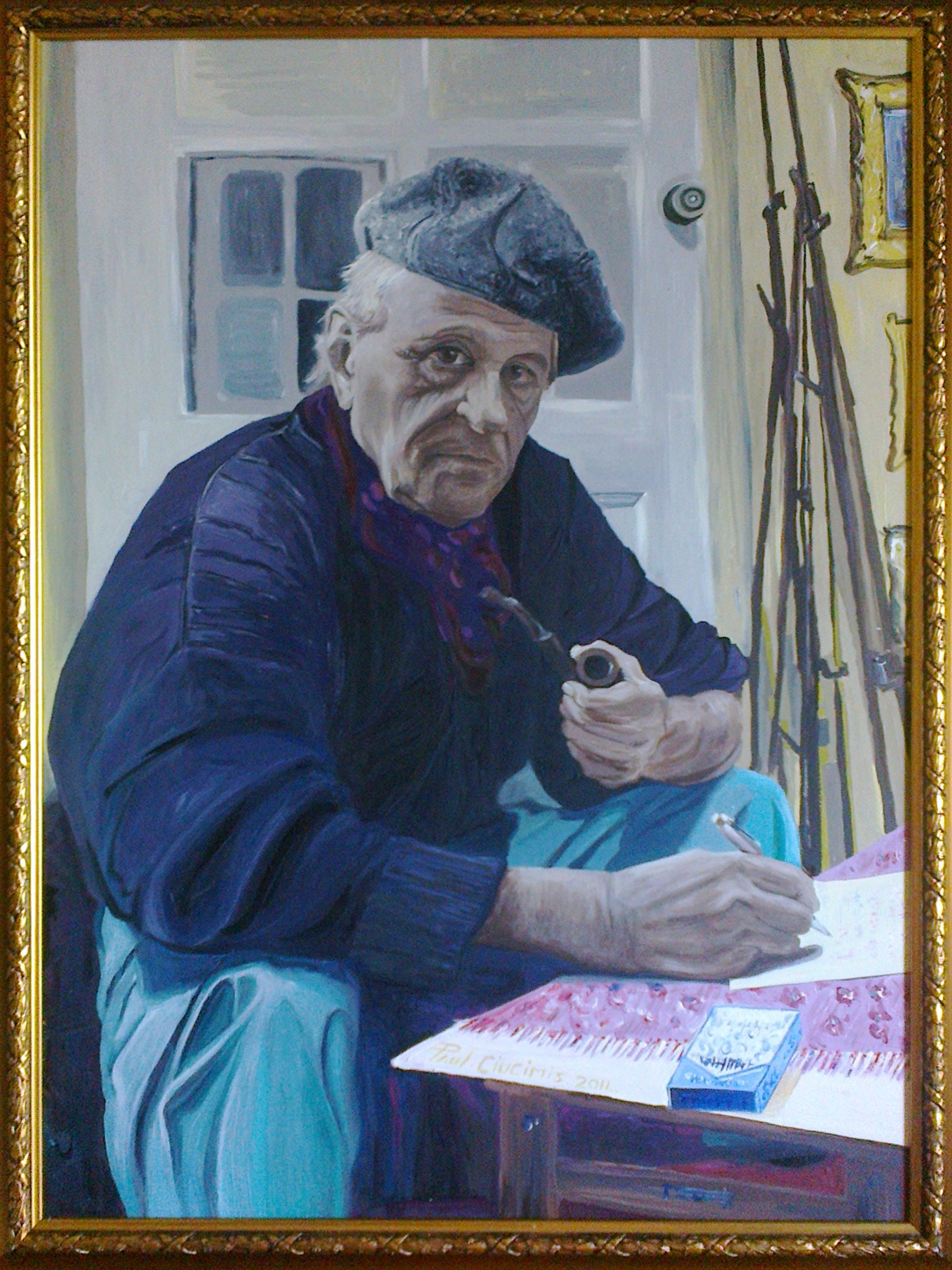 Valeriu Pantazi, portret realizat de către pictorul Paul Mecet Ciuciumiş. Tabloul este în posesia privată a lui Valeriu Pantazi.